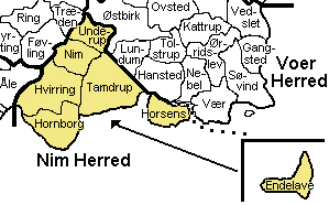 Nim Herred, Skanderborg Amt, Denmark Source: Map by Svend-Erik Christiansen